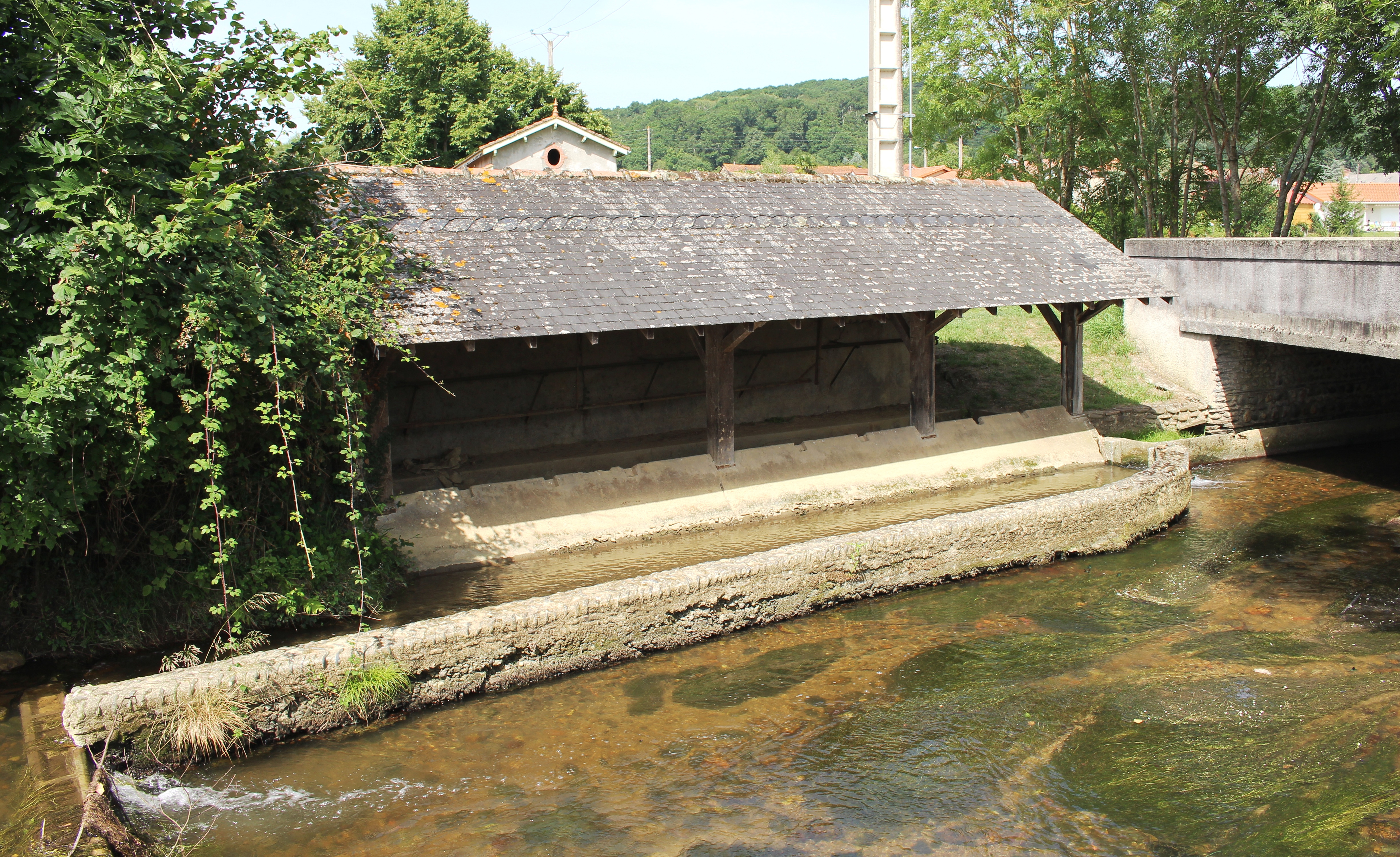 Lavoir de Saint-Lézer (Hautes-Pyrénées)